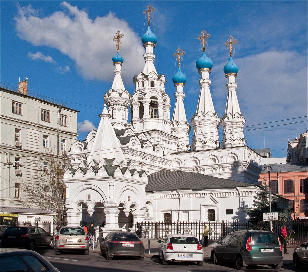 Храм Рождества Пресвятой Богородицы в Путинках